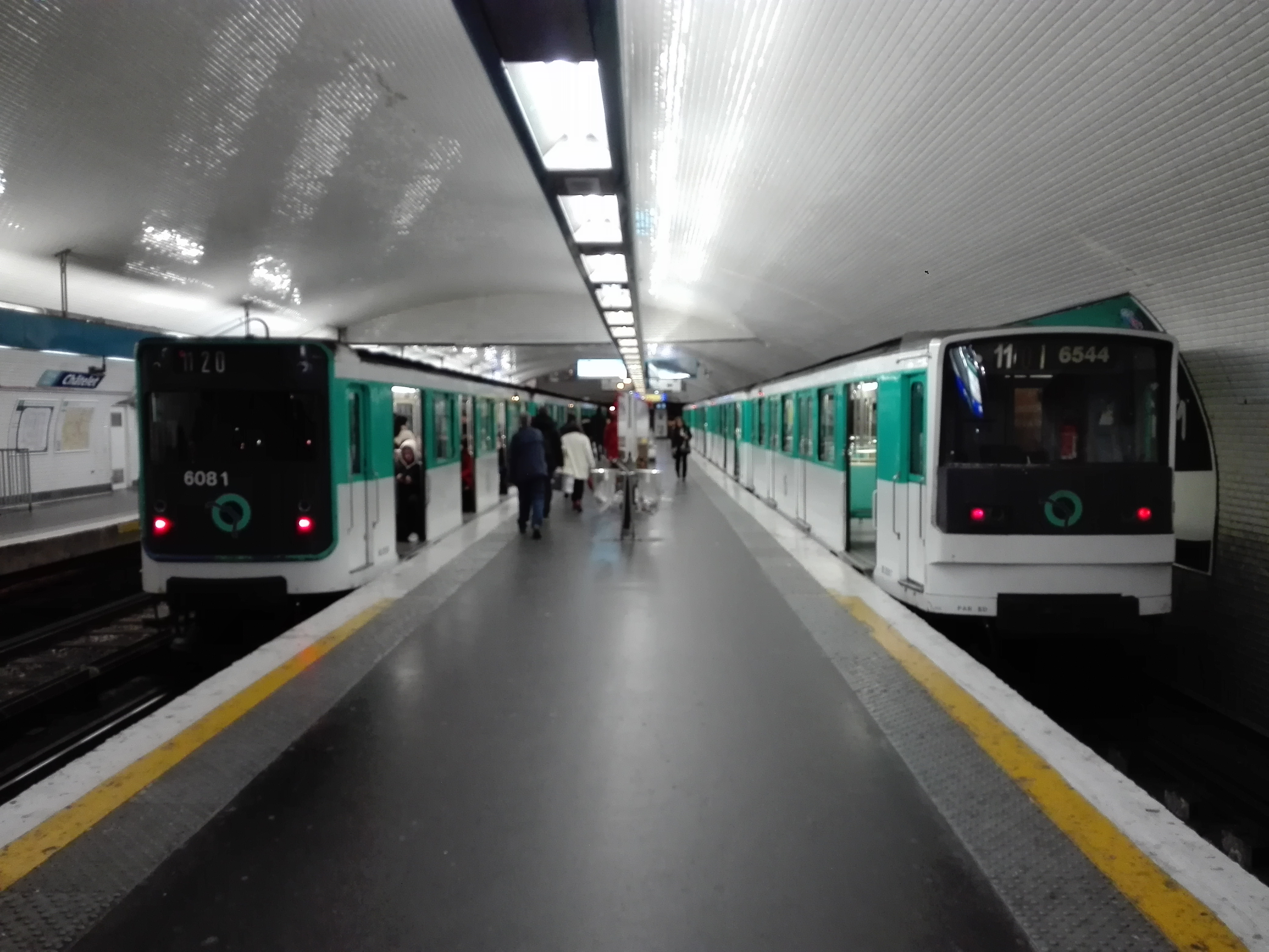 Un MP 59 et un MP 73 stationnés à Châtelet sur la ligne 11.